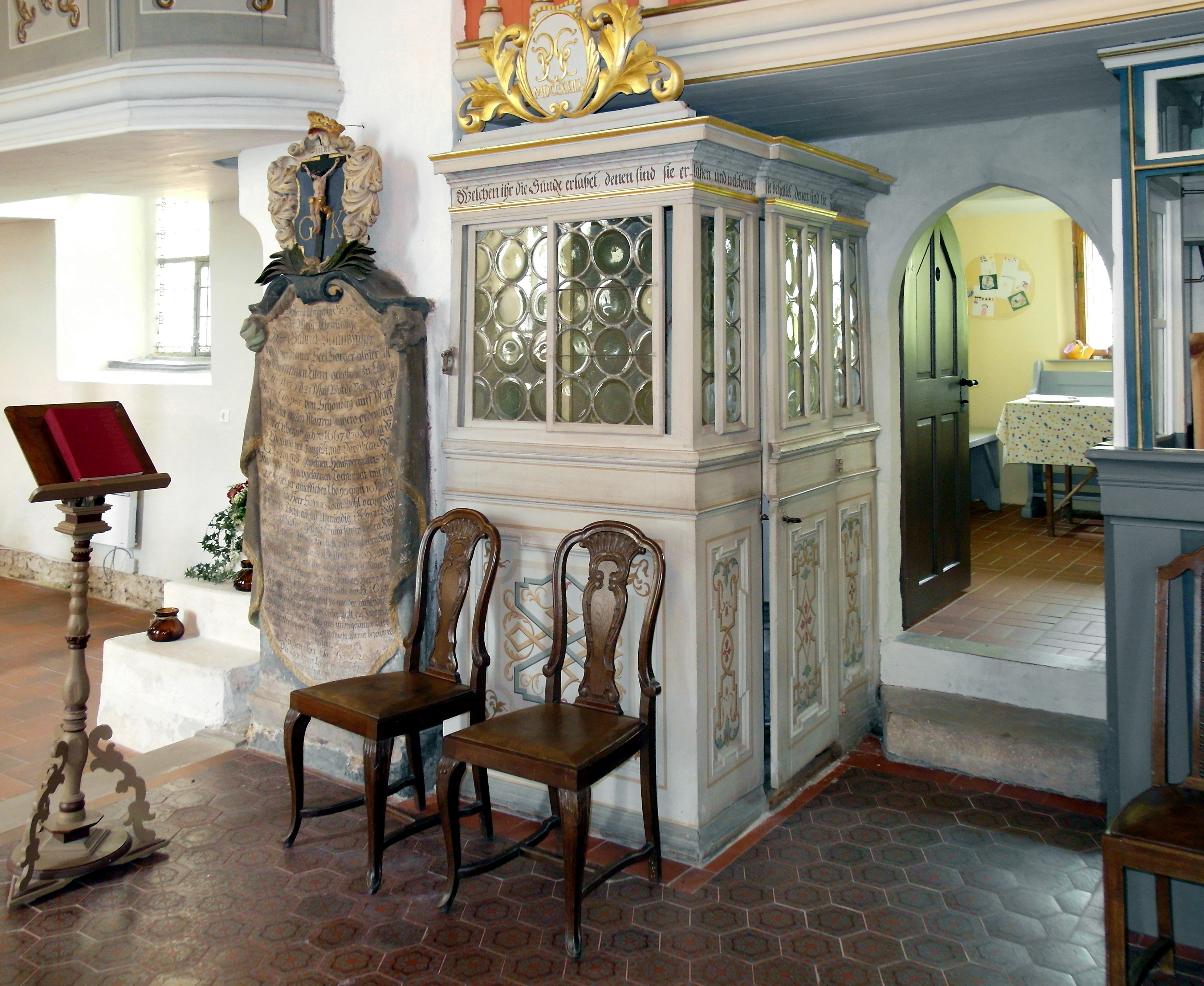 11.07.2018 09619 Helbigsdorf (Mulda): Evangelische Dorfkirche, Hauptstraße (GMP: 50.811503,13.365515). Spätgotik aus dem 14./15. Jahrhundert, 1576 und 1726 erweitert. Überwiegend Barocke Ausstattung. Eine Monogrammkartusche von 1728 bekrönt den evangelischen Beichtstuhl. [SAM6756.JPG]20180711370DR.JPG(c)Blobelt